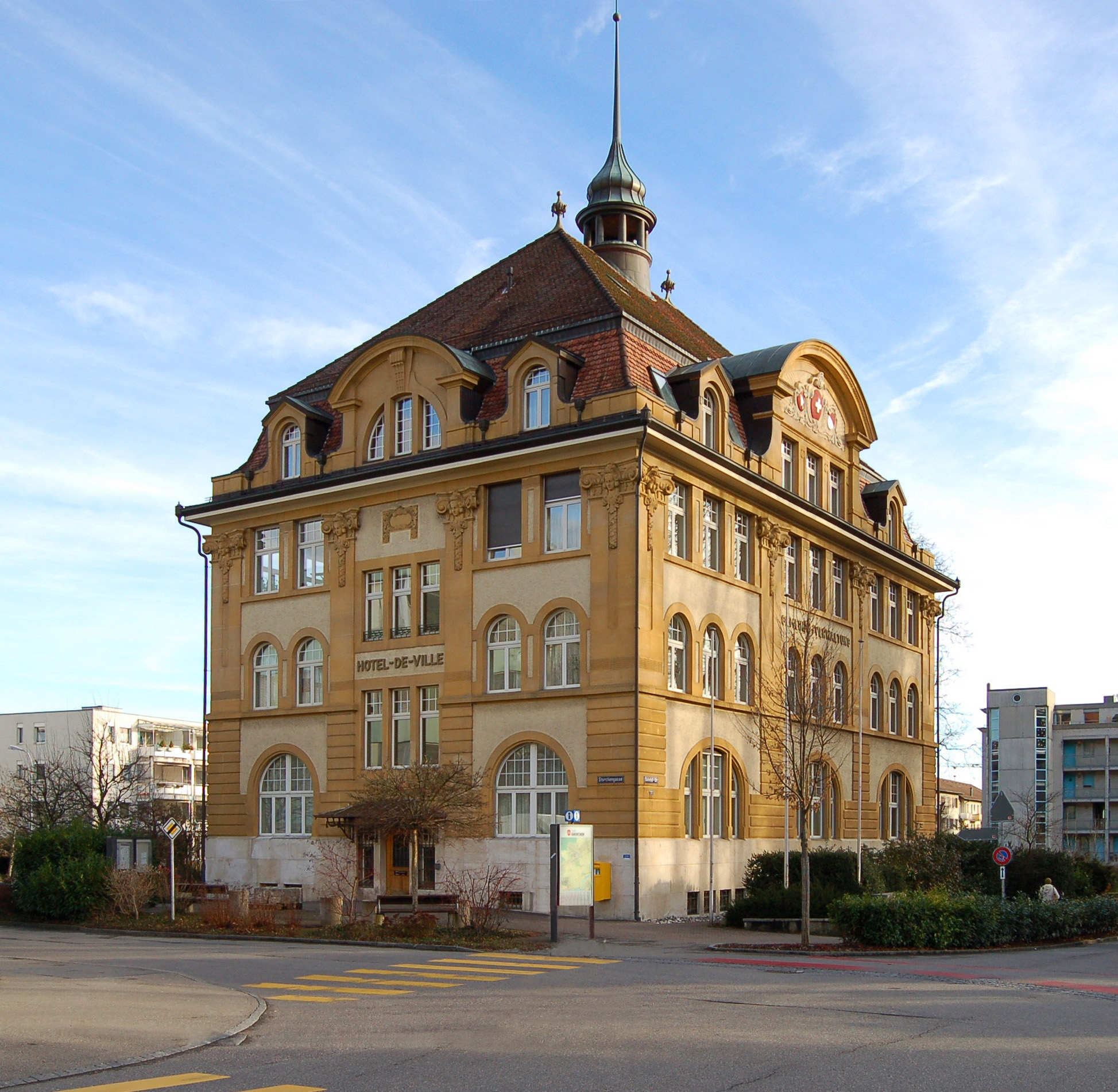 Sitz der Verwaltung und Stadtpräsidium, Grenchen Süd